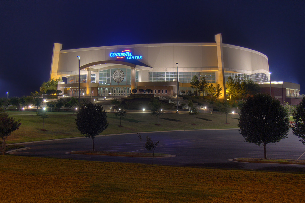 Taken By Dustin Stewart